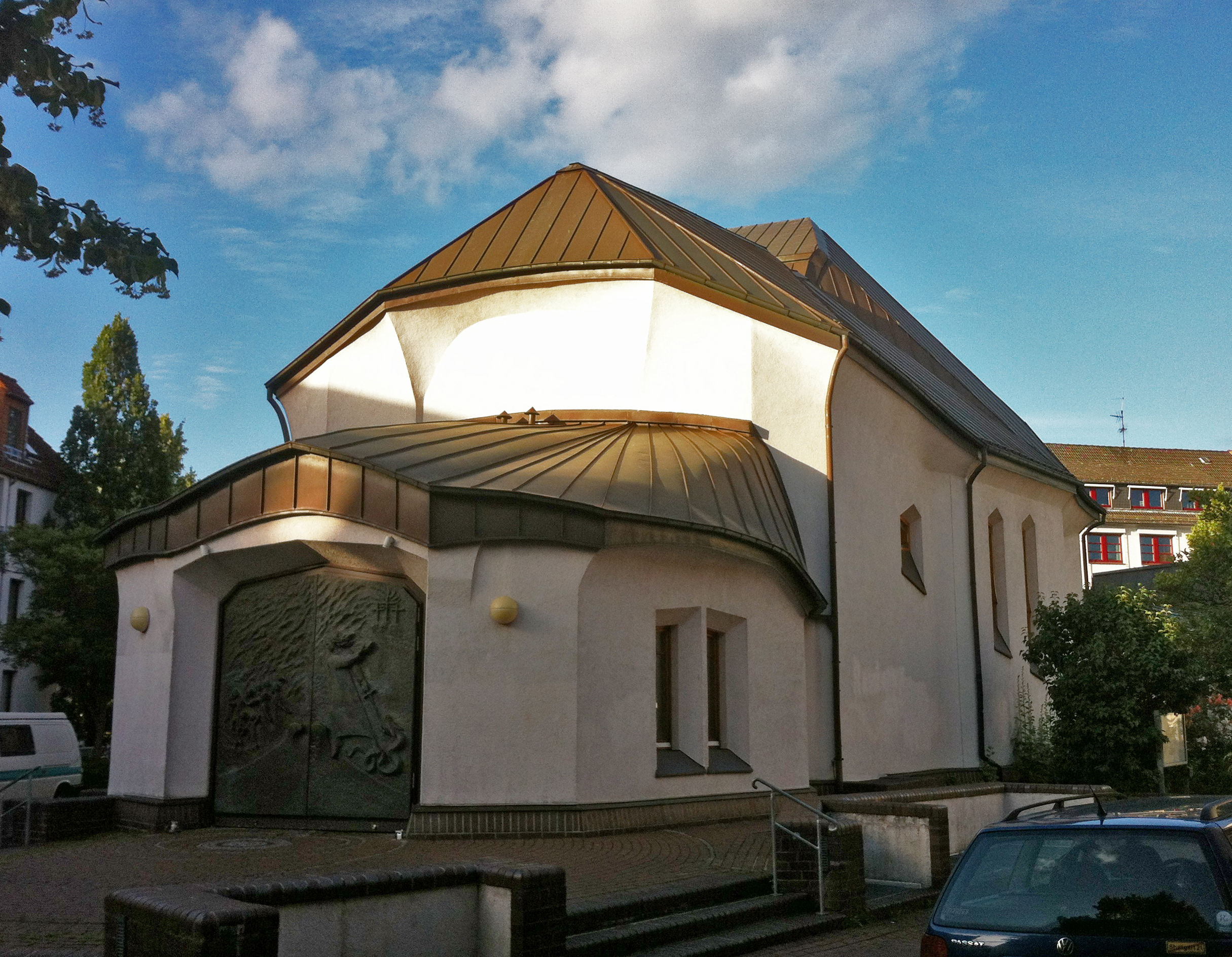 Michael-Kirche der Christengemeinschaft in Bremen